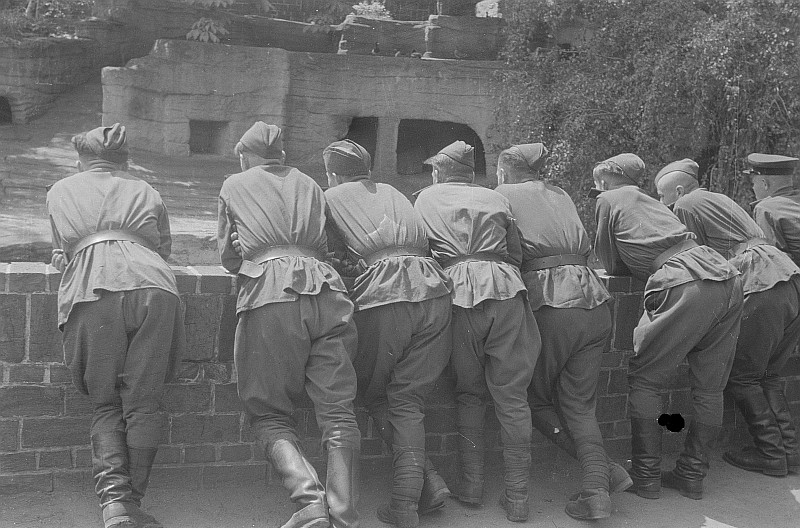 Original image description from the Deutsche FotothekRotarmisten vor einem Gehege in Deutschland bei einem Freizeitausflug 1948 in Leipzig